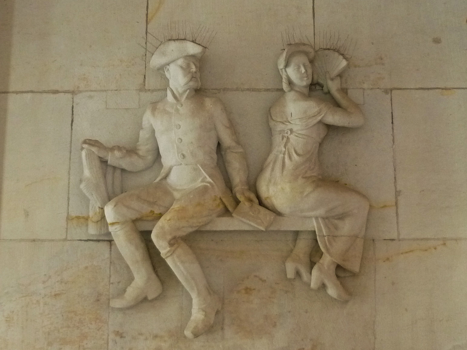 Relief „Senftenträger übergibt einen Liebesbrief“ von Rudolf Wittig am Südende der Arkaden am Altmarkt (Westseite) / Seestraße in Dresden